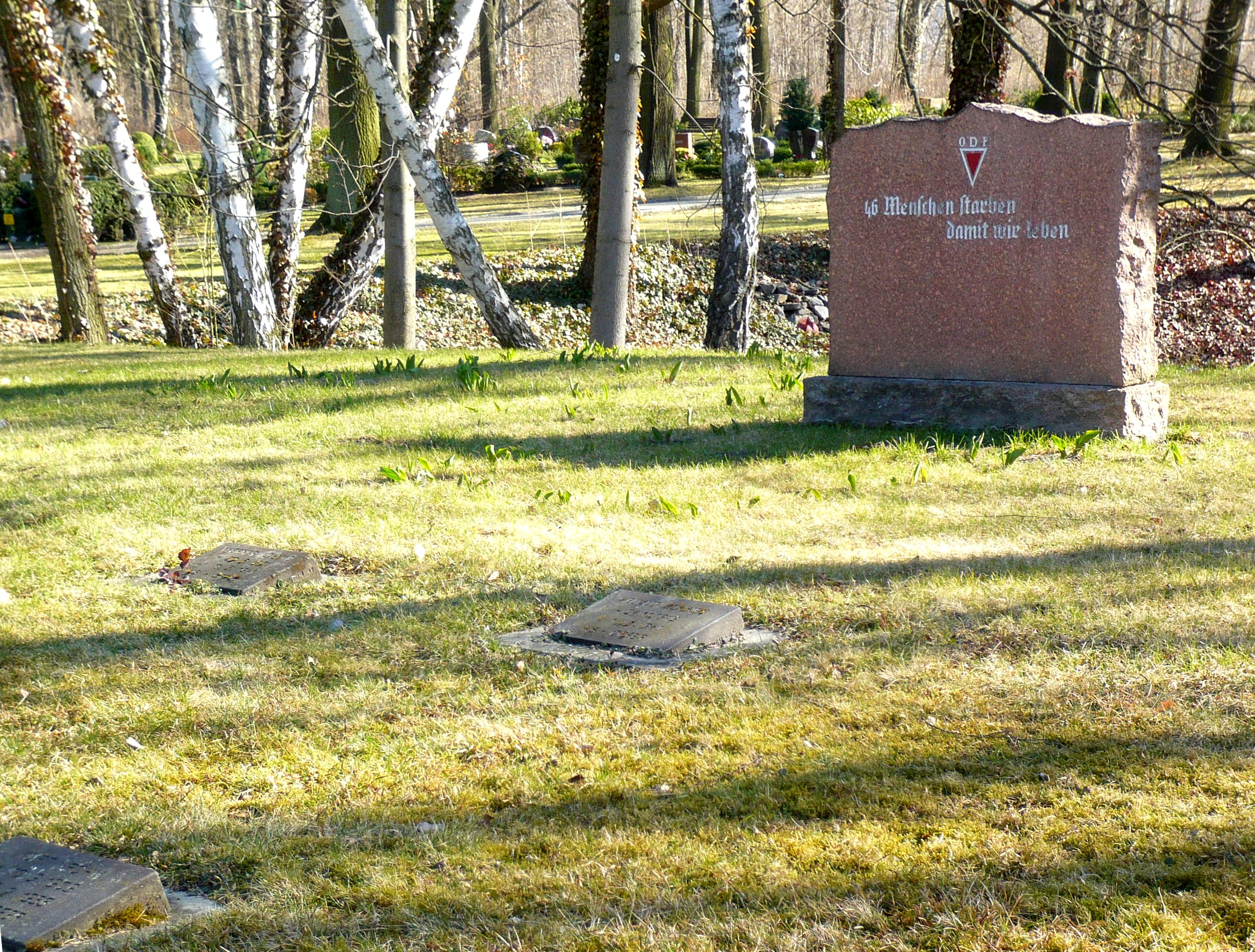 Ortsteil Marzahn: Parkfriedhof Wiesenburger Weg, Grabstätten für 46 Opfer des Faschismus